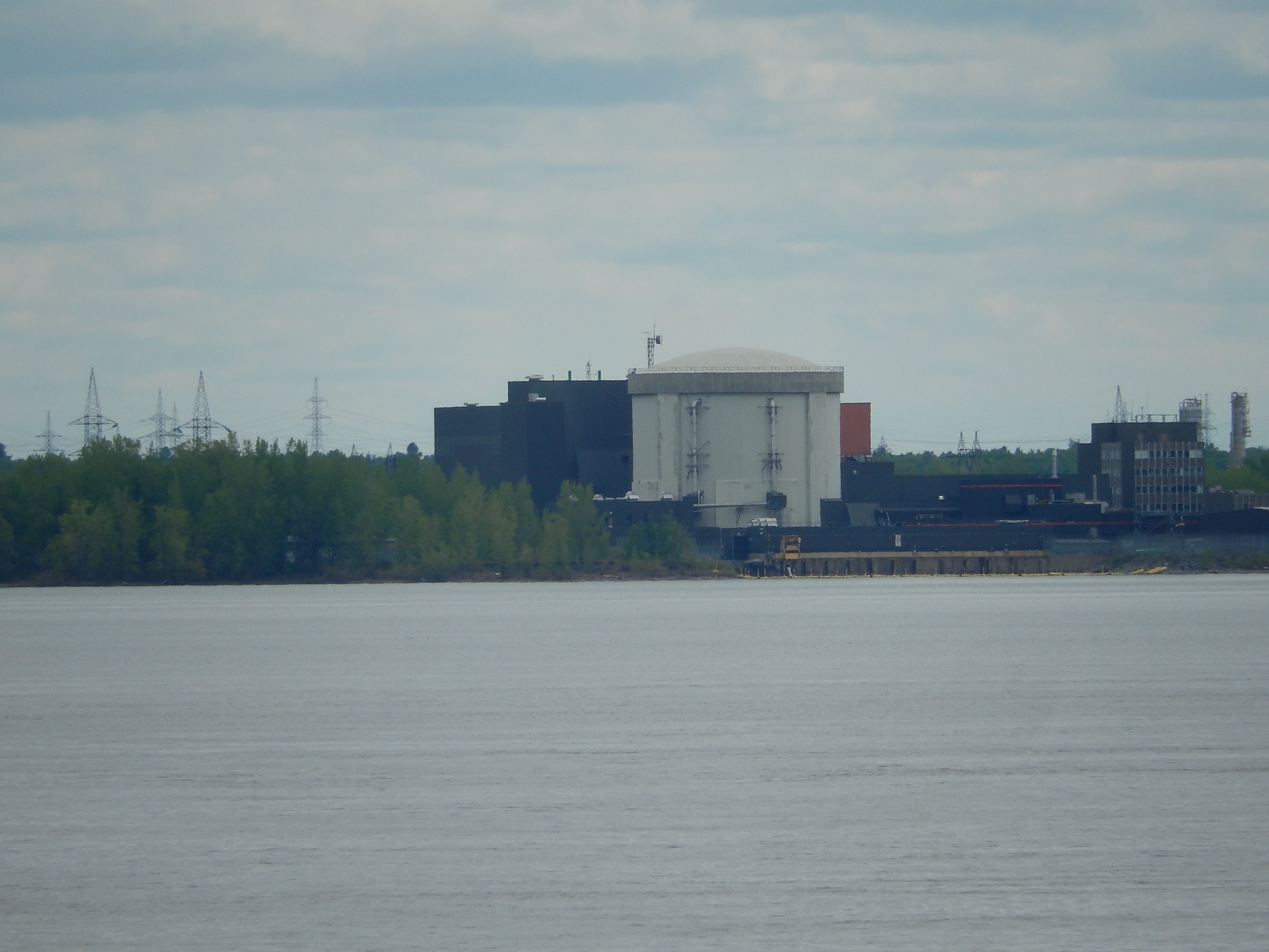 Centrale Gentilly 2 vue de Champlain